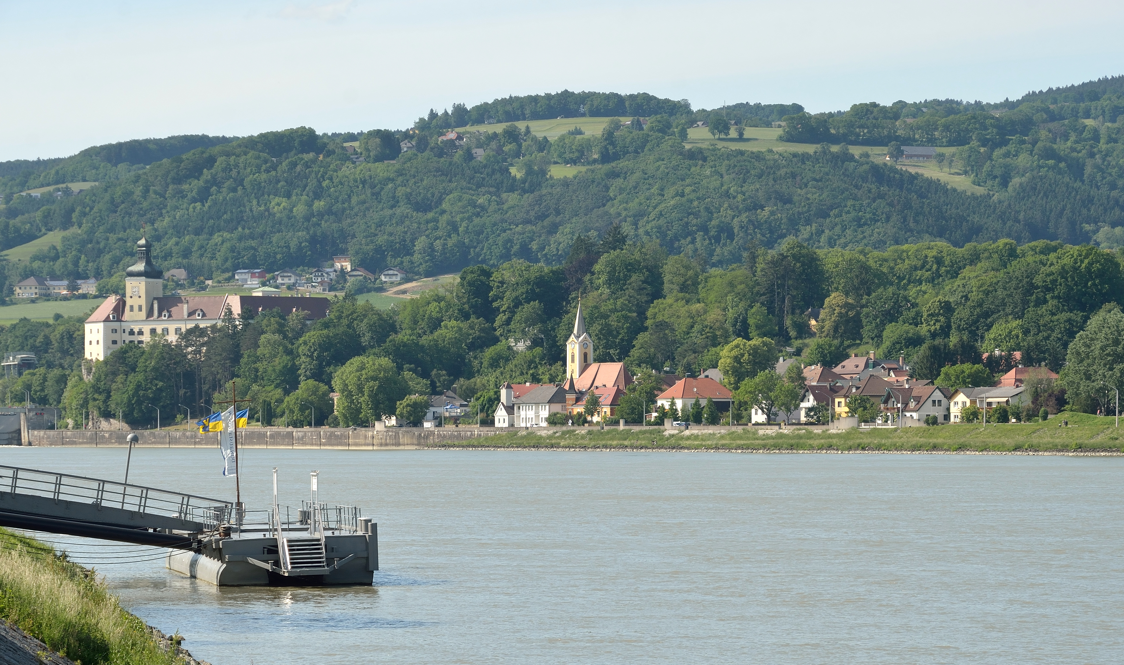 Blick über die Donau auf Persenbeug (Schloss, Florianikapelle) von Ybbs an der Donau aus.